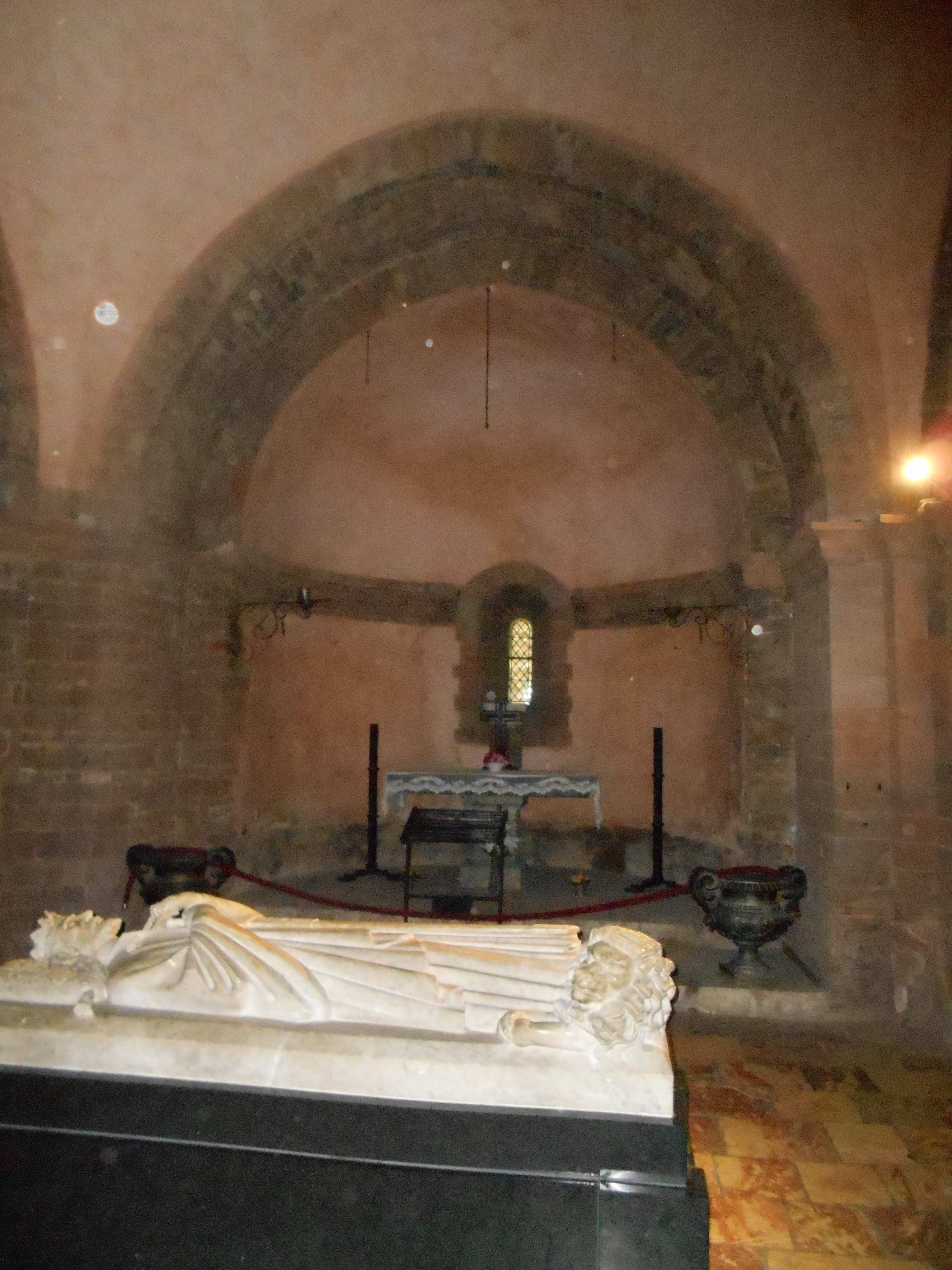 Absis de la capella de Santa Maria dels Còrrecs